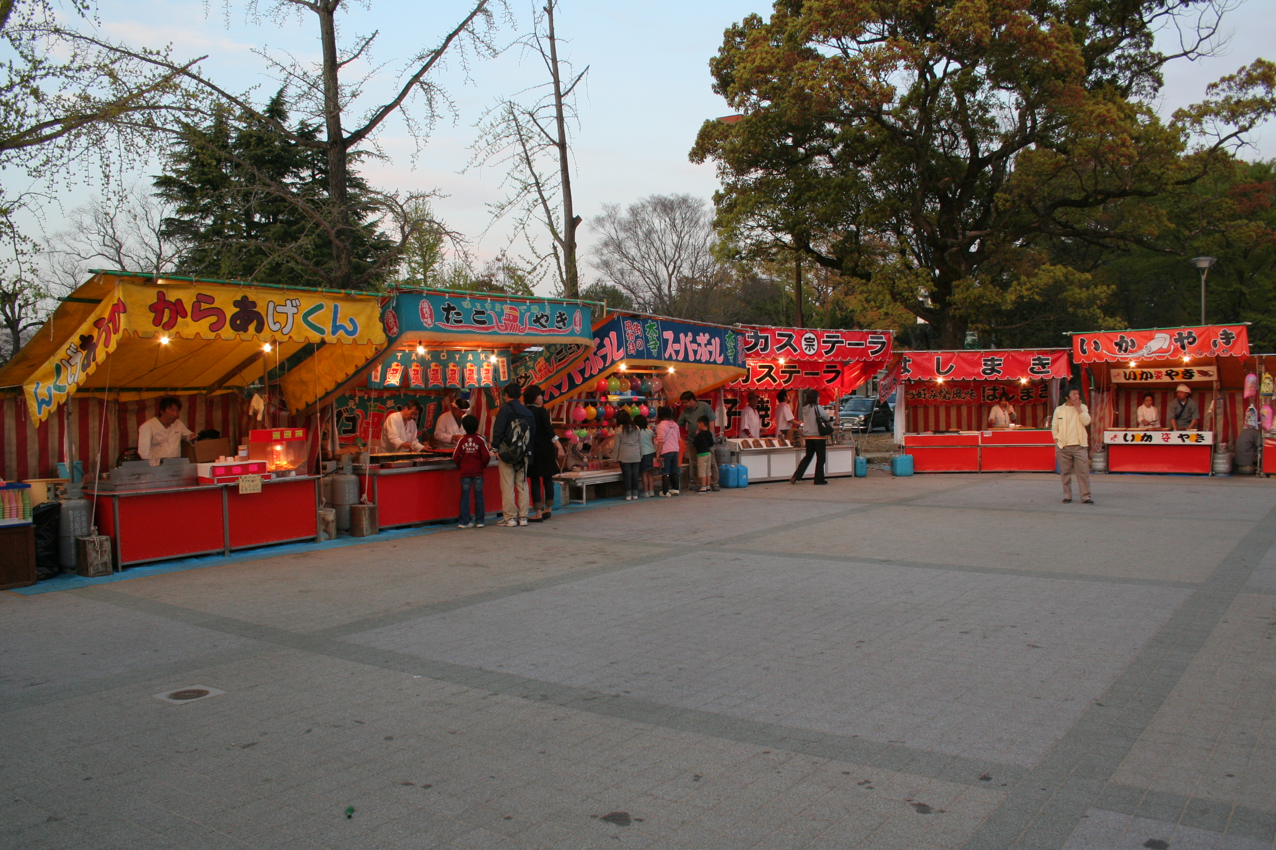 日本の飲食物などを提供する屋台。